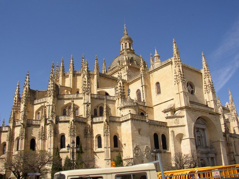 Segovia. (Castilla-León. España) Catedral Fotografía realizada el 21 abril de 2003 por el autor:User:Pelayo2